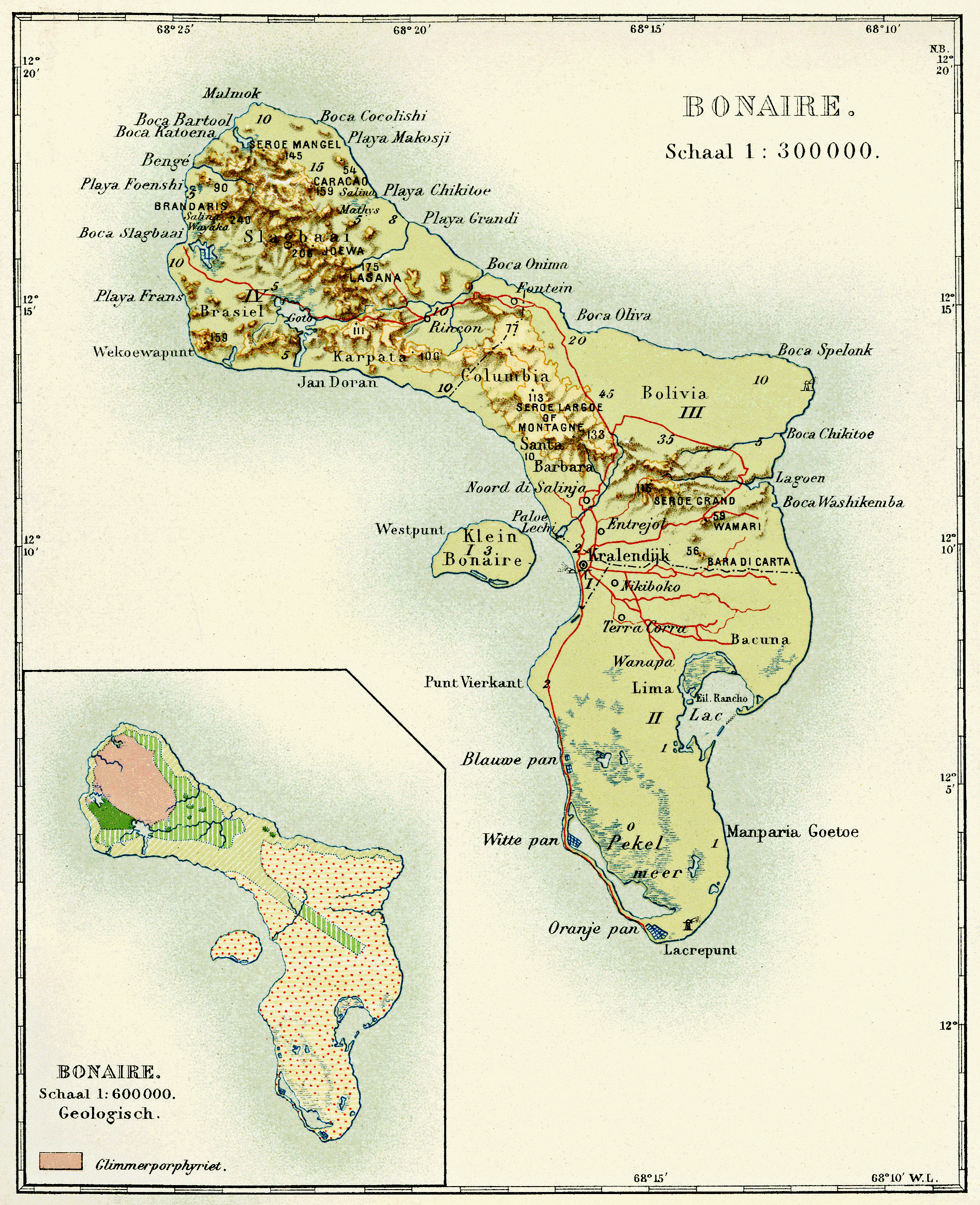 Bonaire - Karte aus der Enzyklopädie der Niederländischen Antillen.